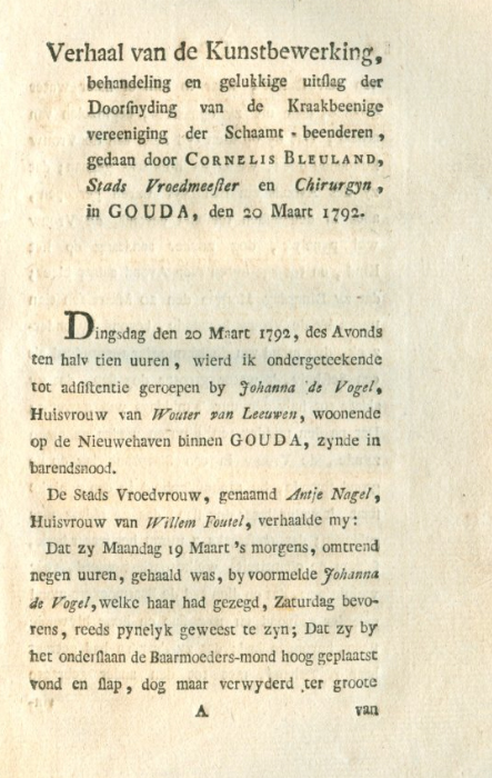 Eerste pagina van "Verhaal van de kunstbewerking, behandeling, en gelukkige uitlag, der doorsnyding van de kraakbeenige vereeniging der schaamt-beenderen."